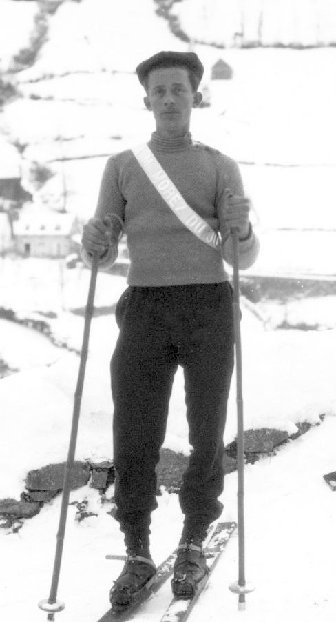 Eaux-Bonnes [Pyrénées-Atlantiques], Mandrillon, janvier 1910 [Grande semaine des Pyrénées, du 21 au 24 janvier] : [photographie de presse] / [Agence Rol]